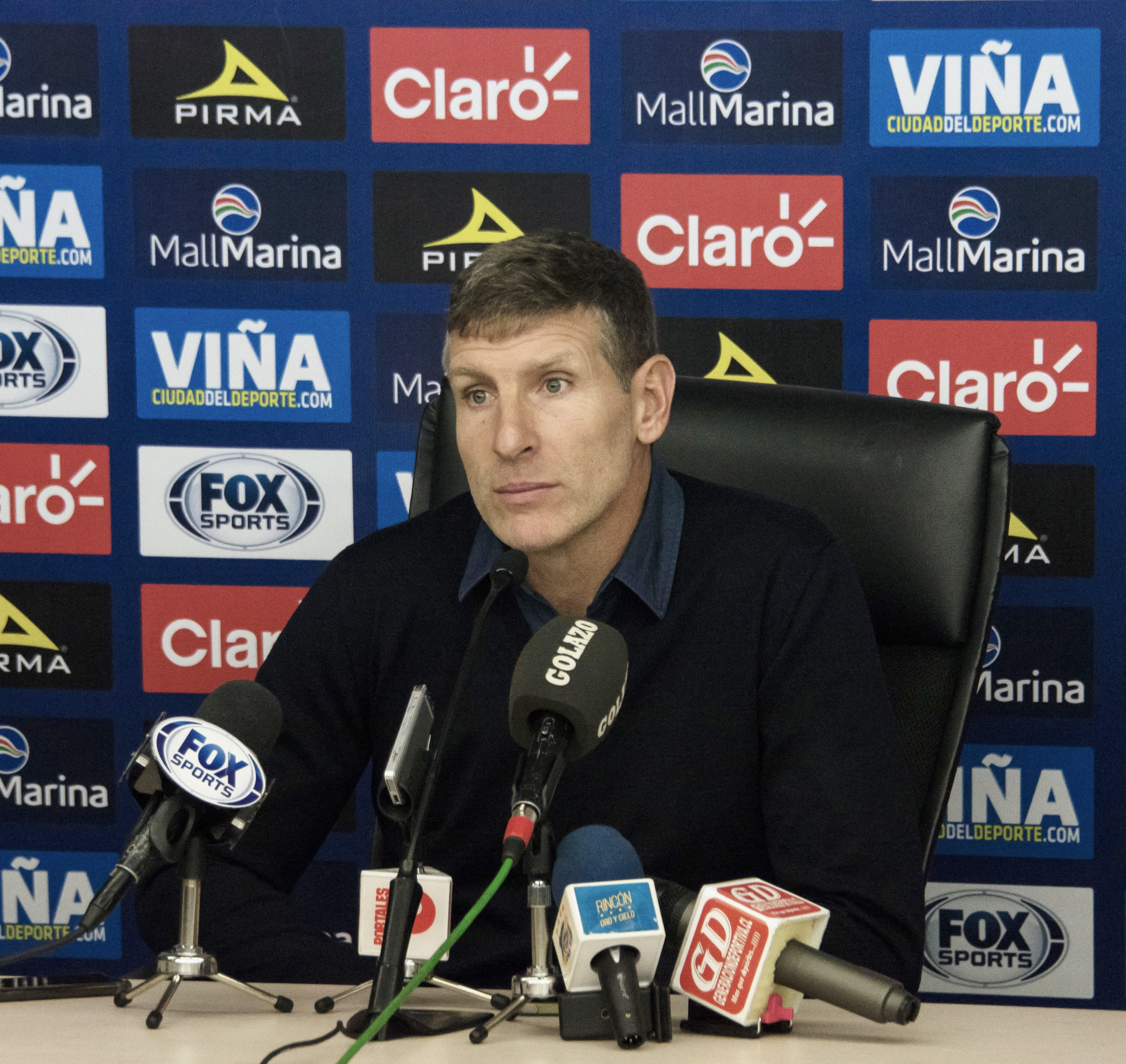 Everton v Unión Española, Estadio Sausalito, Viña del Mar, Chile.